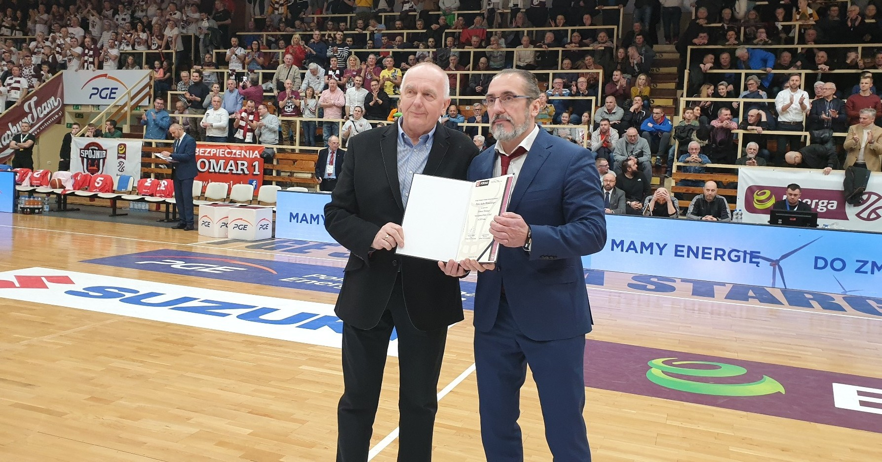 Stargard, 08.02.2020. Trener Jacek Winnicki